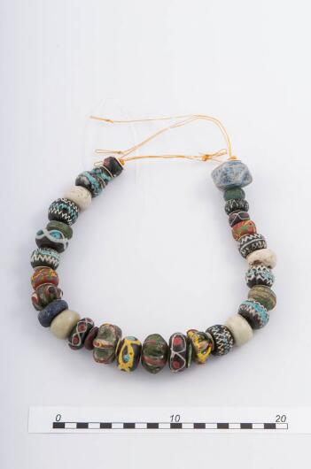 Snoer van dertig grote glazen kralen en Ã©Ã©n grote barnstenen kraal. Hierbij tien bronzen ringen en een bronzen schijf (1952/III-26e-o). Het kralensnoer maakt deel uit van de grafvondst van de â€˜Prinses van Zweelooâ€™. In het midden van de vijfde eeuw na Chr. werd vlak ten zuiden van het oude Drentse dorp Zweeloo een vooraanstaande vrouw begraven. Haar graf werd in 1952 ontdekt. Op basis van textielresten en sieraden kon een reconstructie van haar kleding worden gemaakt. Het meest bijzondere aan haar uitdossing was wel het snoer van enorme grote glazen kralen rond haar middel.